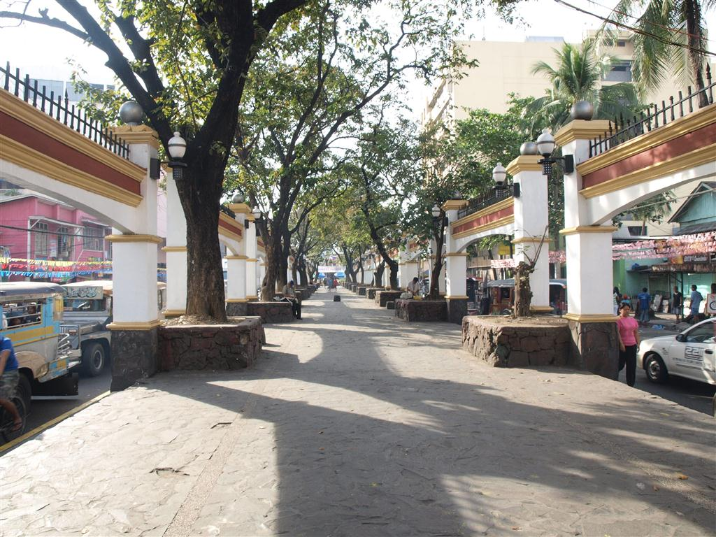 Plaza Moriones in Manila, Philippines